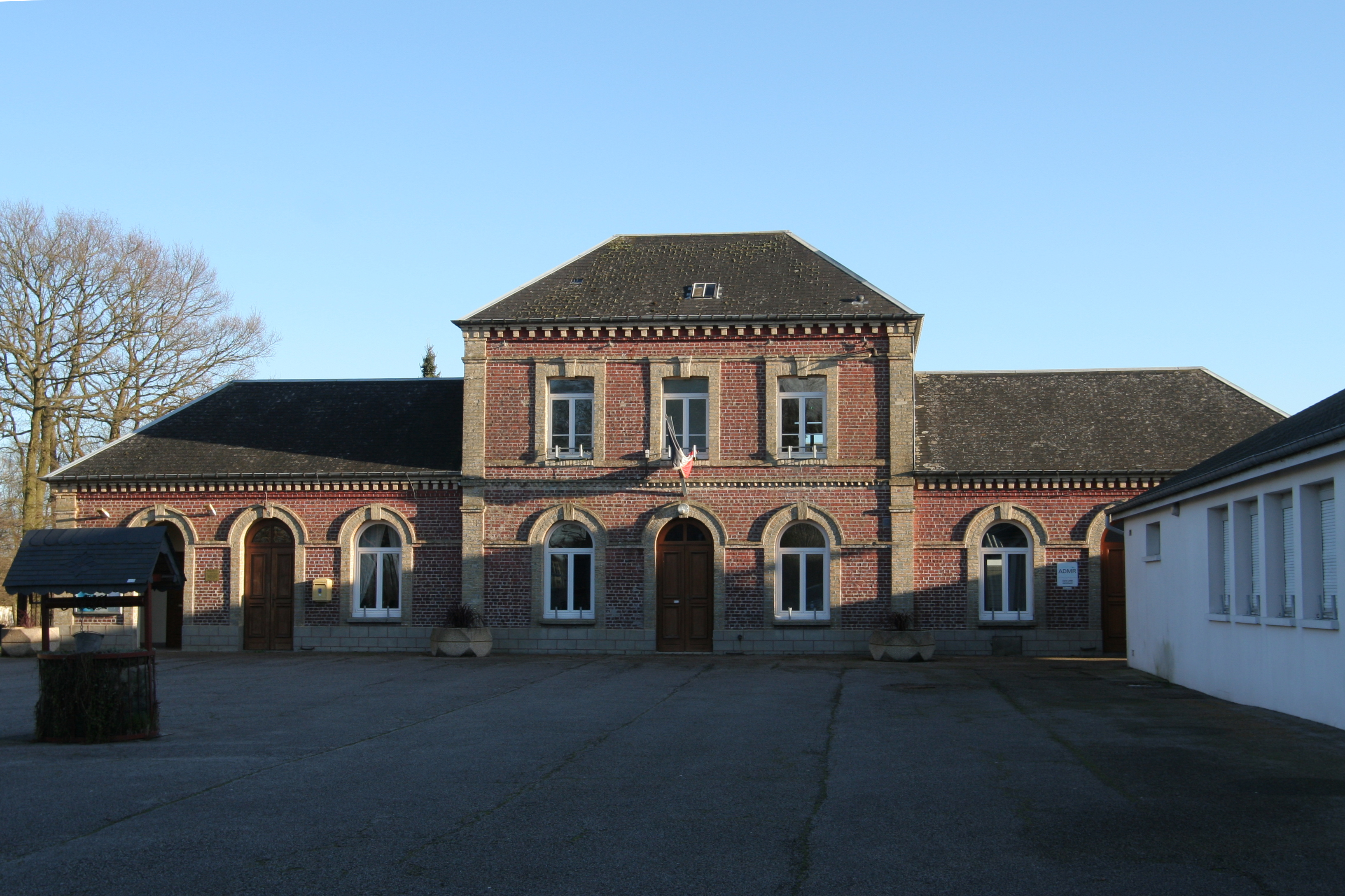 Mairie de Saint-Antoine-la-Forêt.